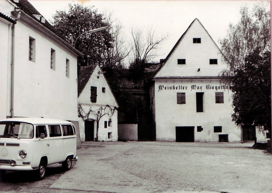 Blick auf den Klosterkeller